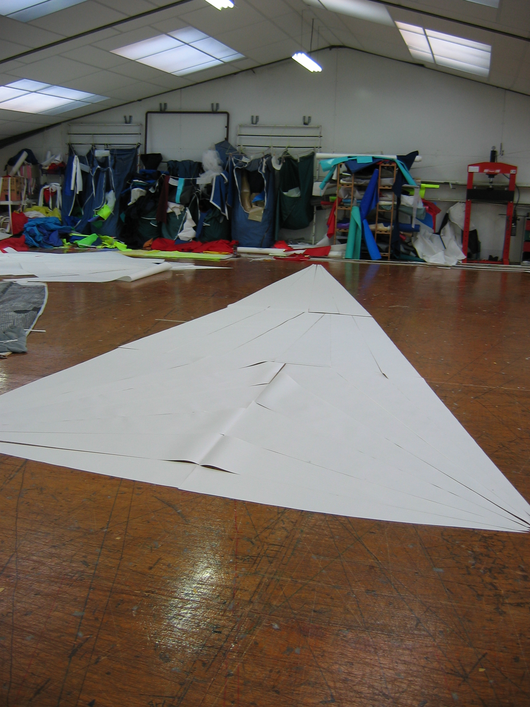 Ledañ al lec'hedoù